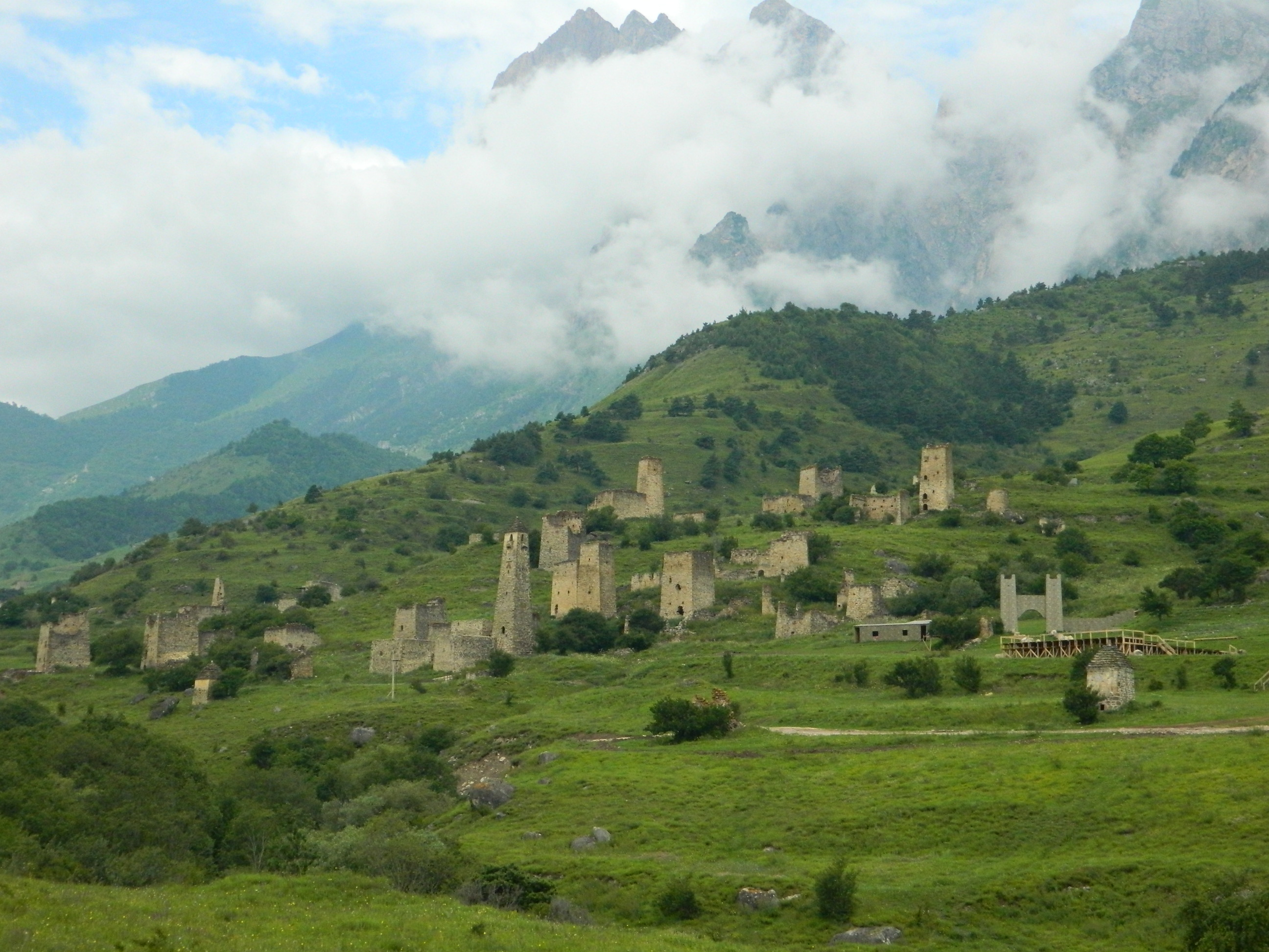 Башенный комплекс в Джейрахском районе республики Ингушетия